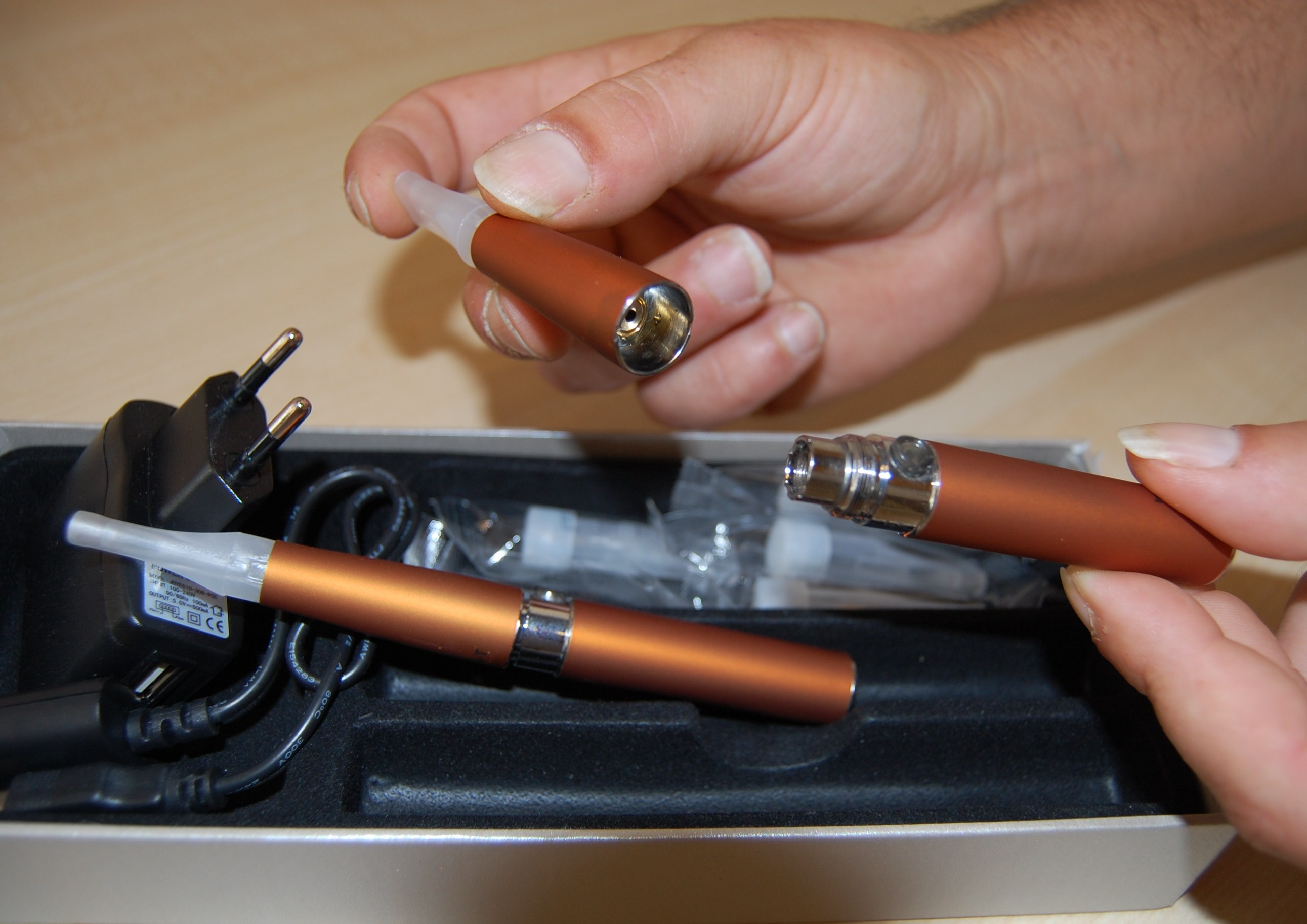 Elektronische Zigaretten (einmal aufgeschraubt, einmal zusammengeschraubt) mit Aromabehältern (Hintergrund) und Ladegerät (links)